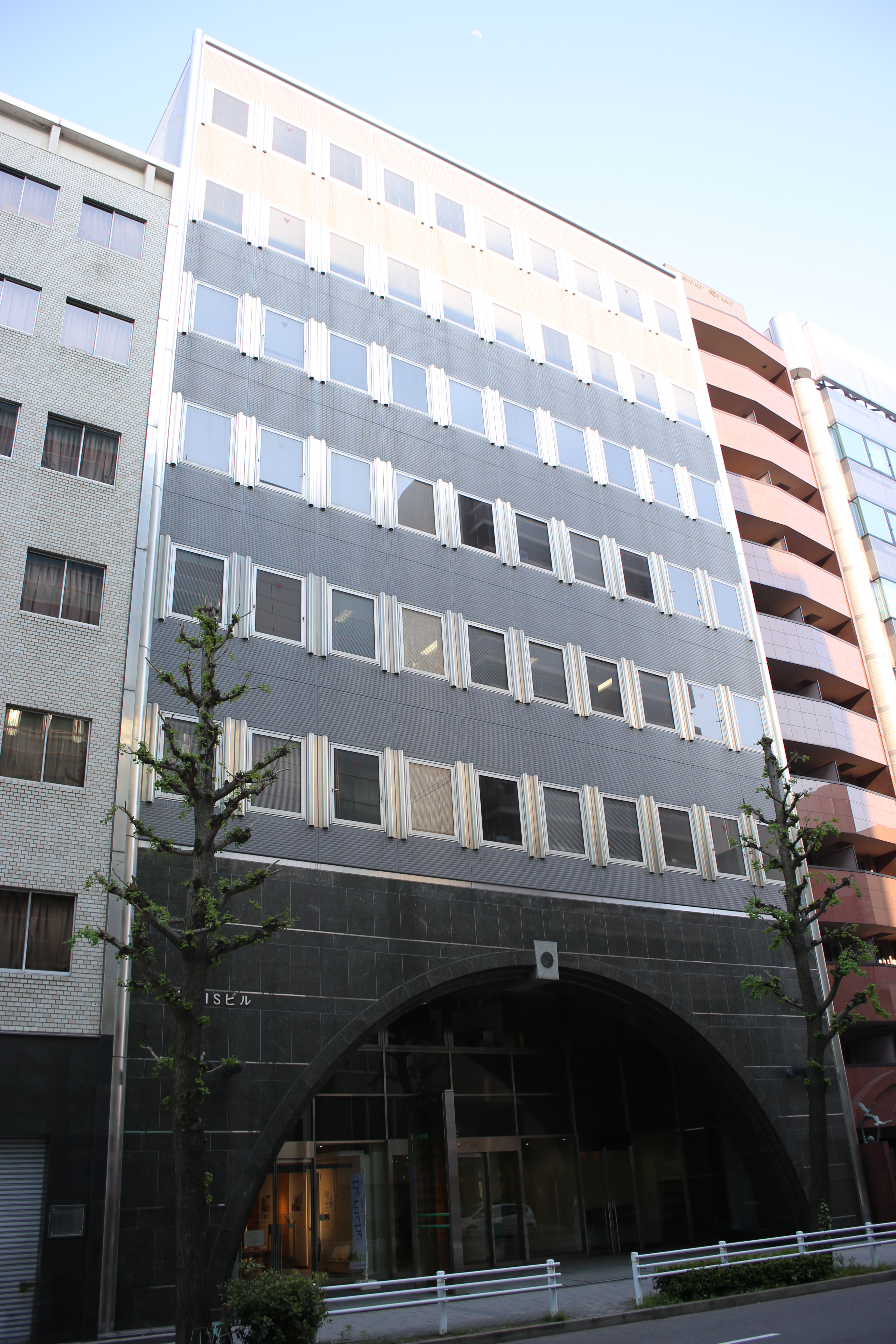 名古屋市中区錦三丁目の錦SISビルを西側公道北側より撮影